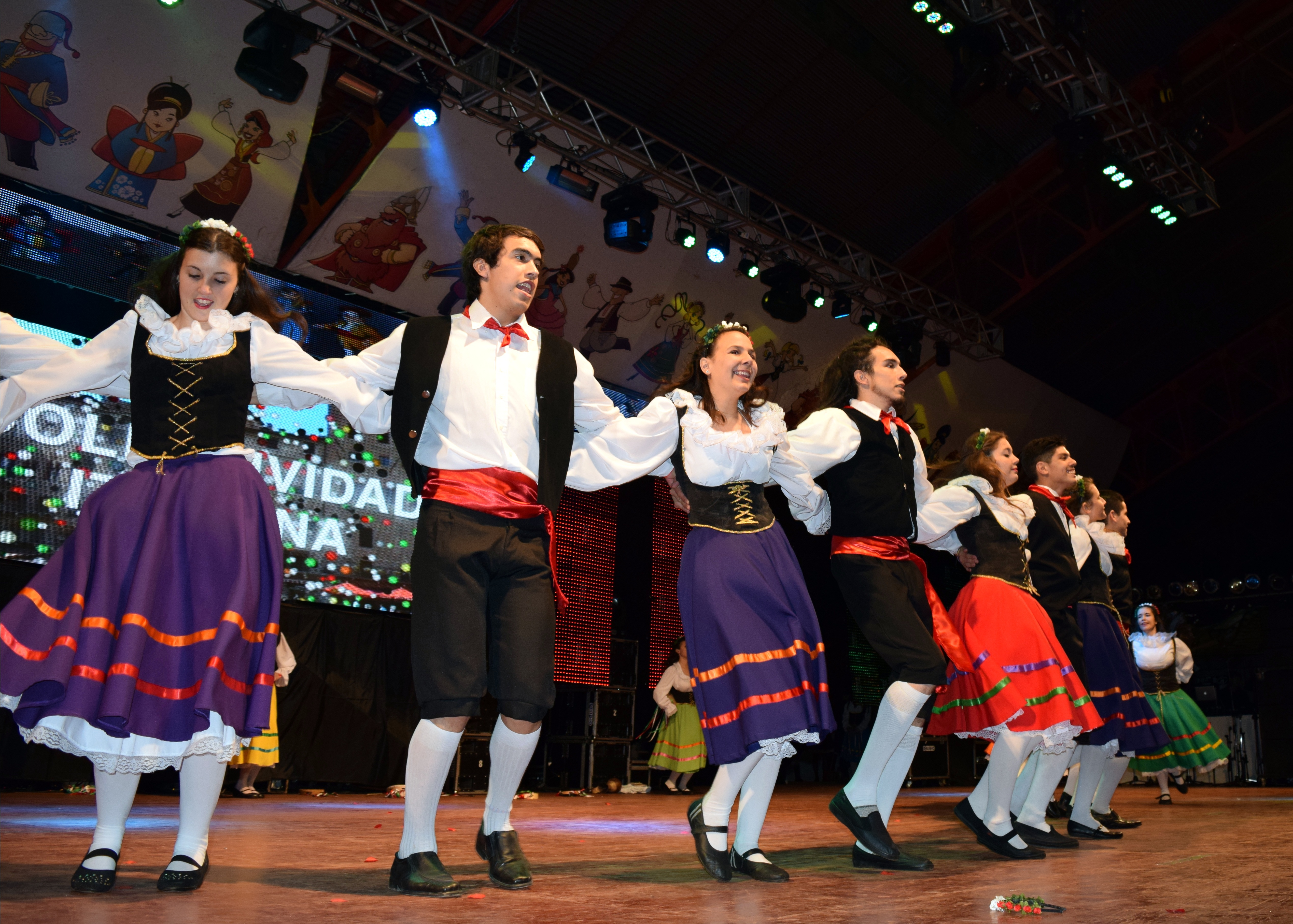 El Ballet Il "Giardino d'Italia" en el escenario mayor durante la XXXV Fiesta Nacional del Inmigrante en Oberá, Misiones, Argentina.